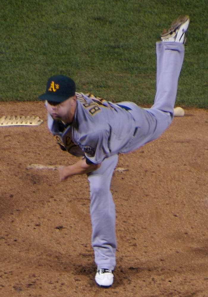 Dallas Braden